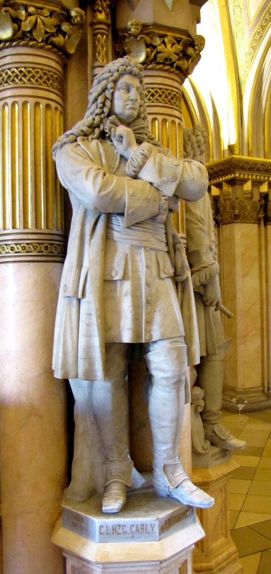 Statue des Herzogs Karl V. von Lothringen in der Feldherrenhalle des Heeresgeschichtlichen Museums in Wien.